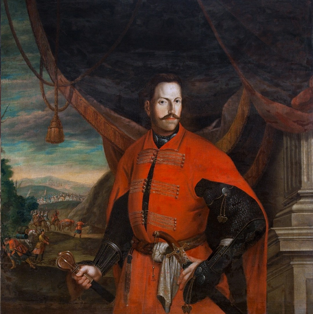 Aleksander Jan Jabłonowski